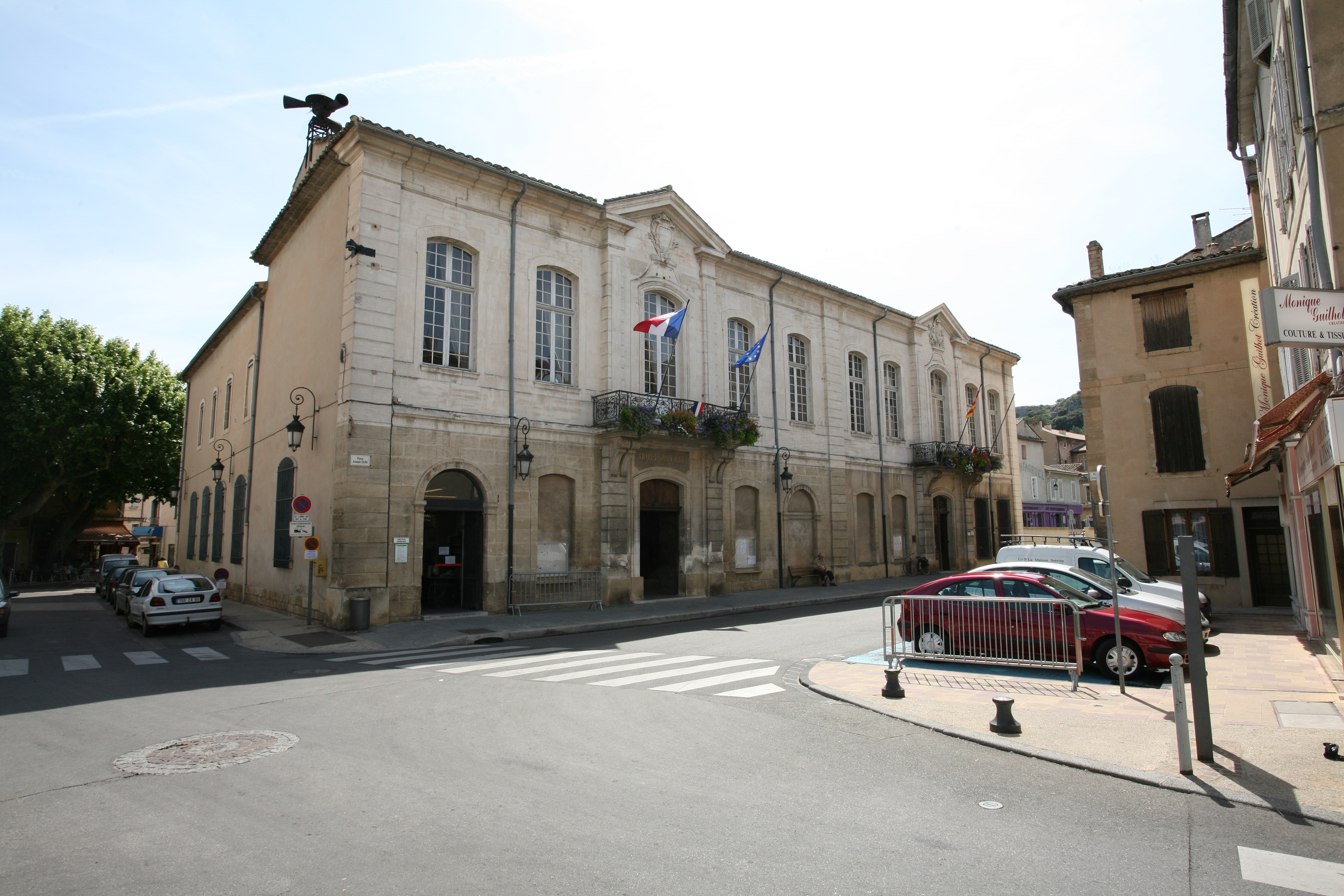 Mairie de Cavaillon, Vaucluse